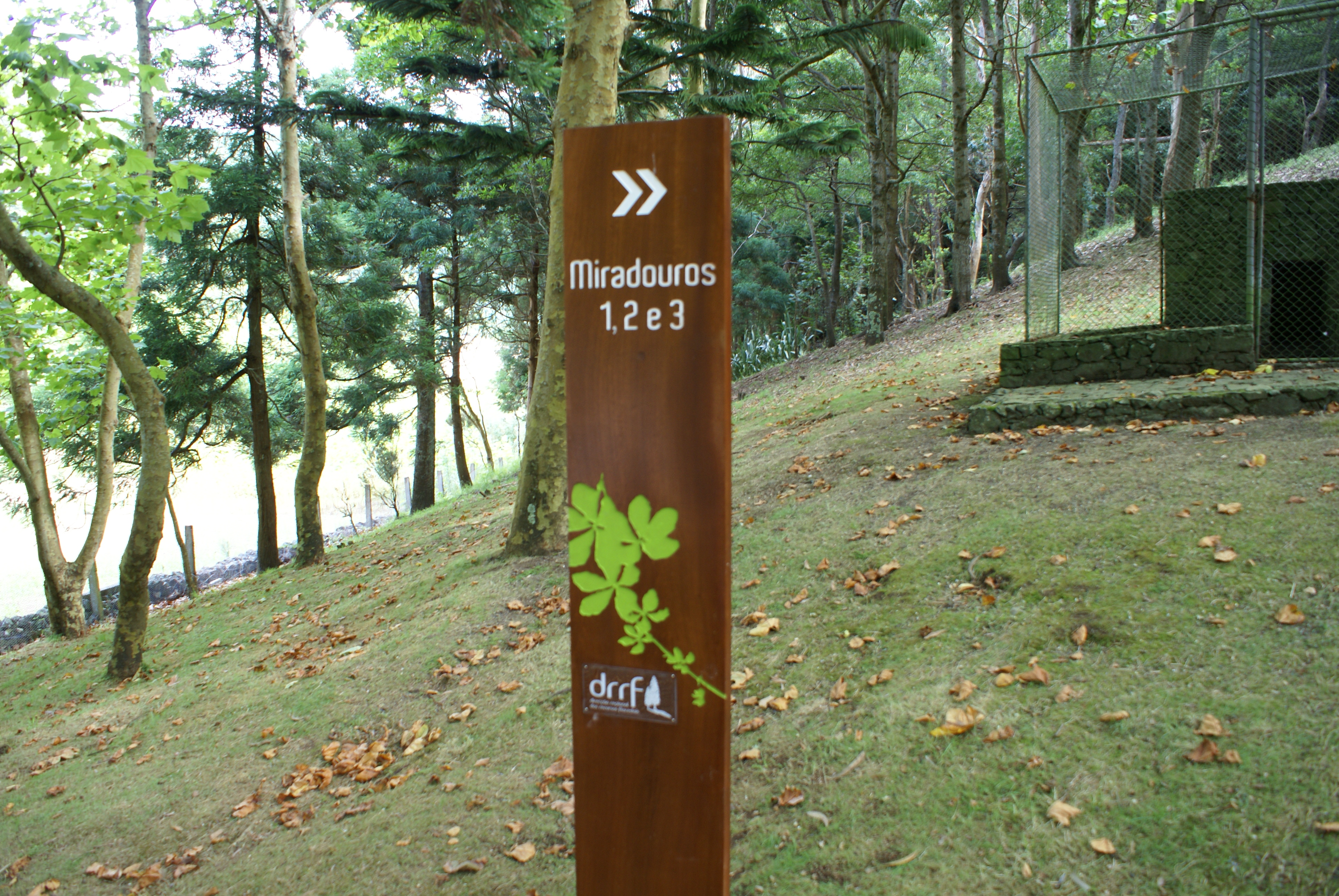 Caldeira da Graciosa, Miradouro 1,2 e 3, Santa Cruz da Graciosa, Açores, Portugal